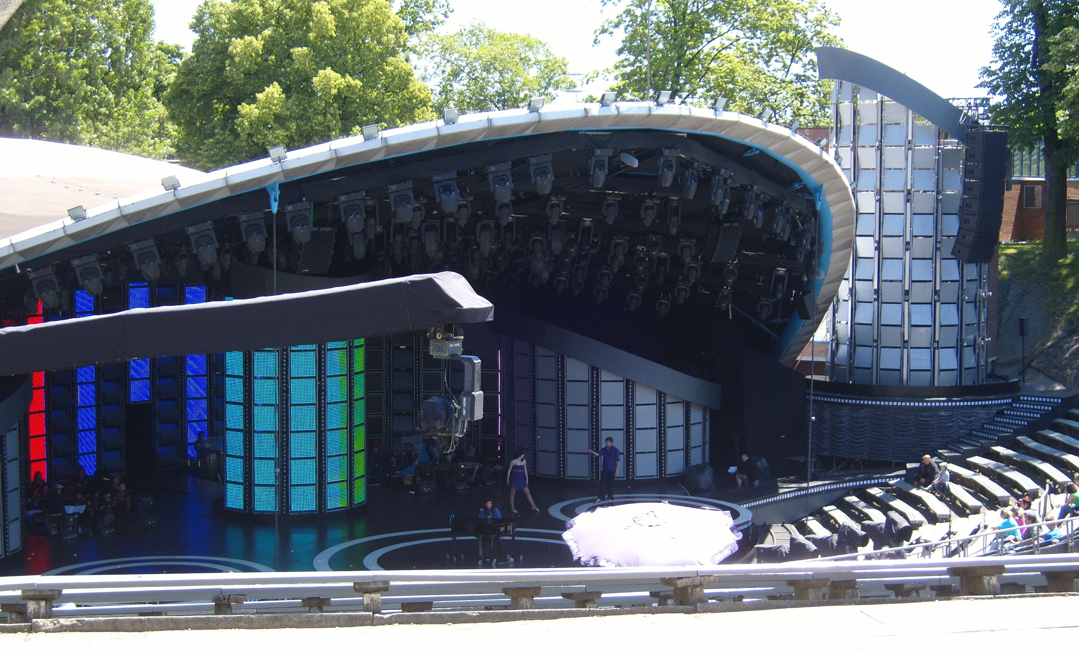 Amfiteatr Tysiąclecia w Opolu - próba przed 46. KFPP w Opolu. Na scenie Reni Jusis.